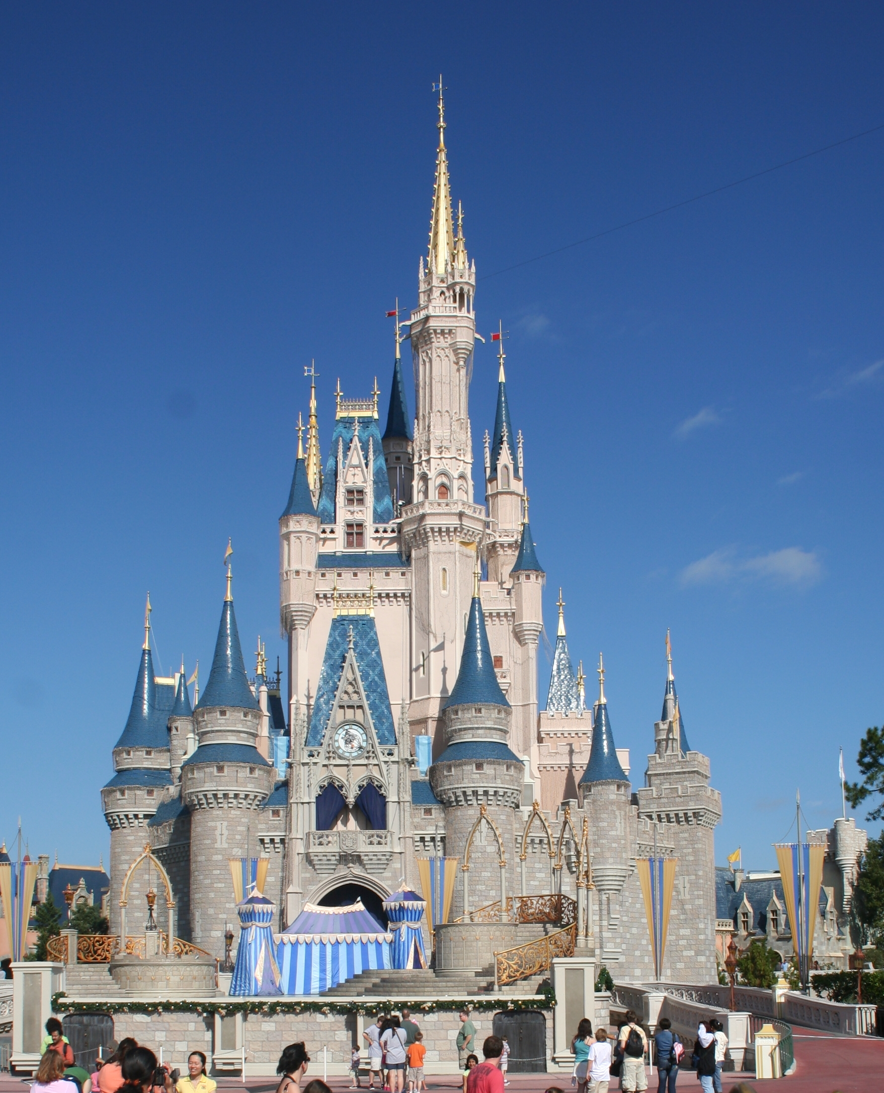 മാജിക് കിങ്ങ്ഡത്തിന്റെ ചിഹ്നമായ സിൻഡറെല്ലയുടെ കൊട്ടാരം - വാൾട്ട് ഡിസ്നി വേൾഡ് റിസോർട്ടിലെ മാജിക് കിങ്ങ്ഡം, ഫ്ലോറിഡ